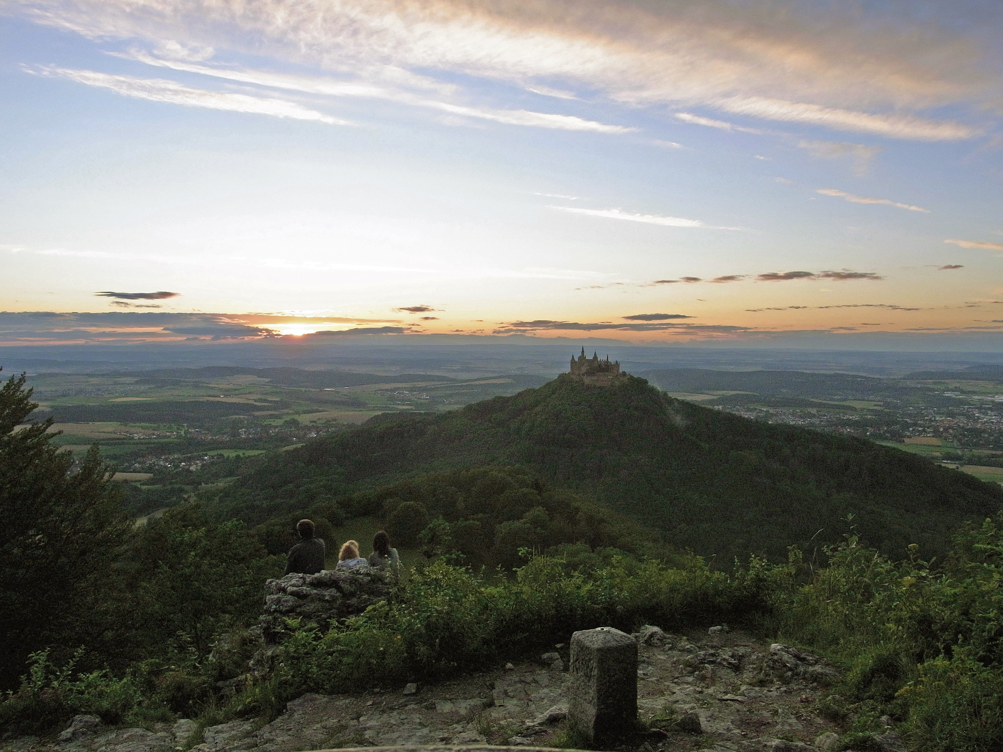 Burg Hohenzollern: Abendstimmung vom Zeller Horn aus gesehen